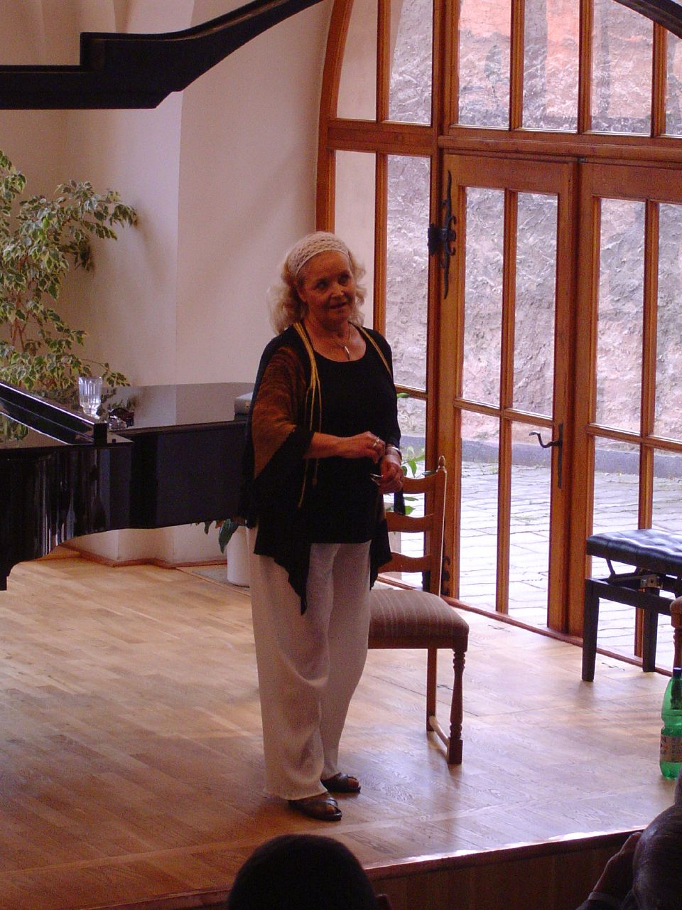 OKH 2005: Gabriela Vránová